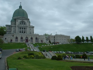 Photographie prise le 22 mai 2004 par wagner51 2004 wagner51